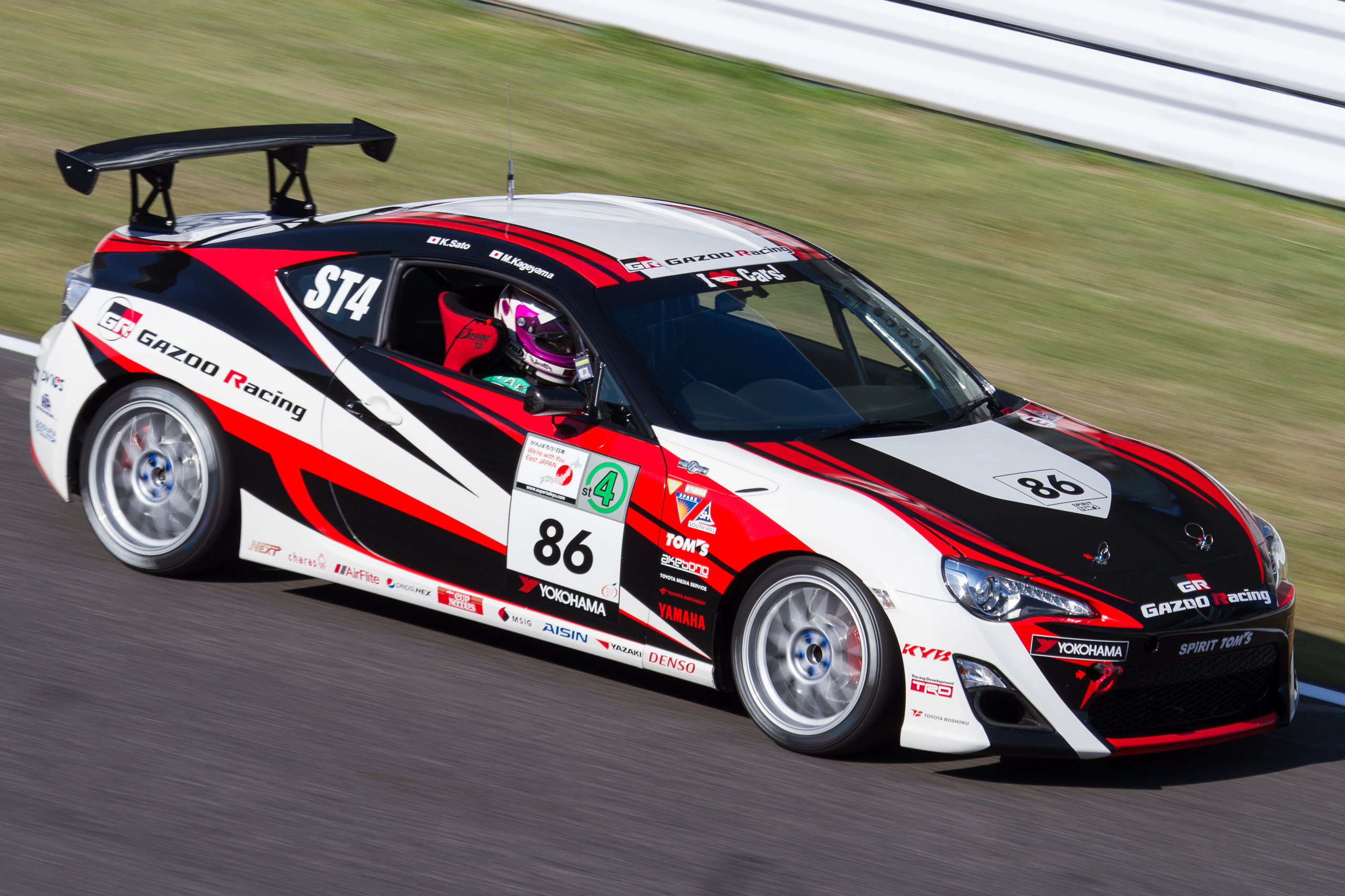 Super Taikyu 2012 Rd.5 Suzuka: Gazoo Racing Toyota 86